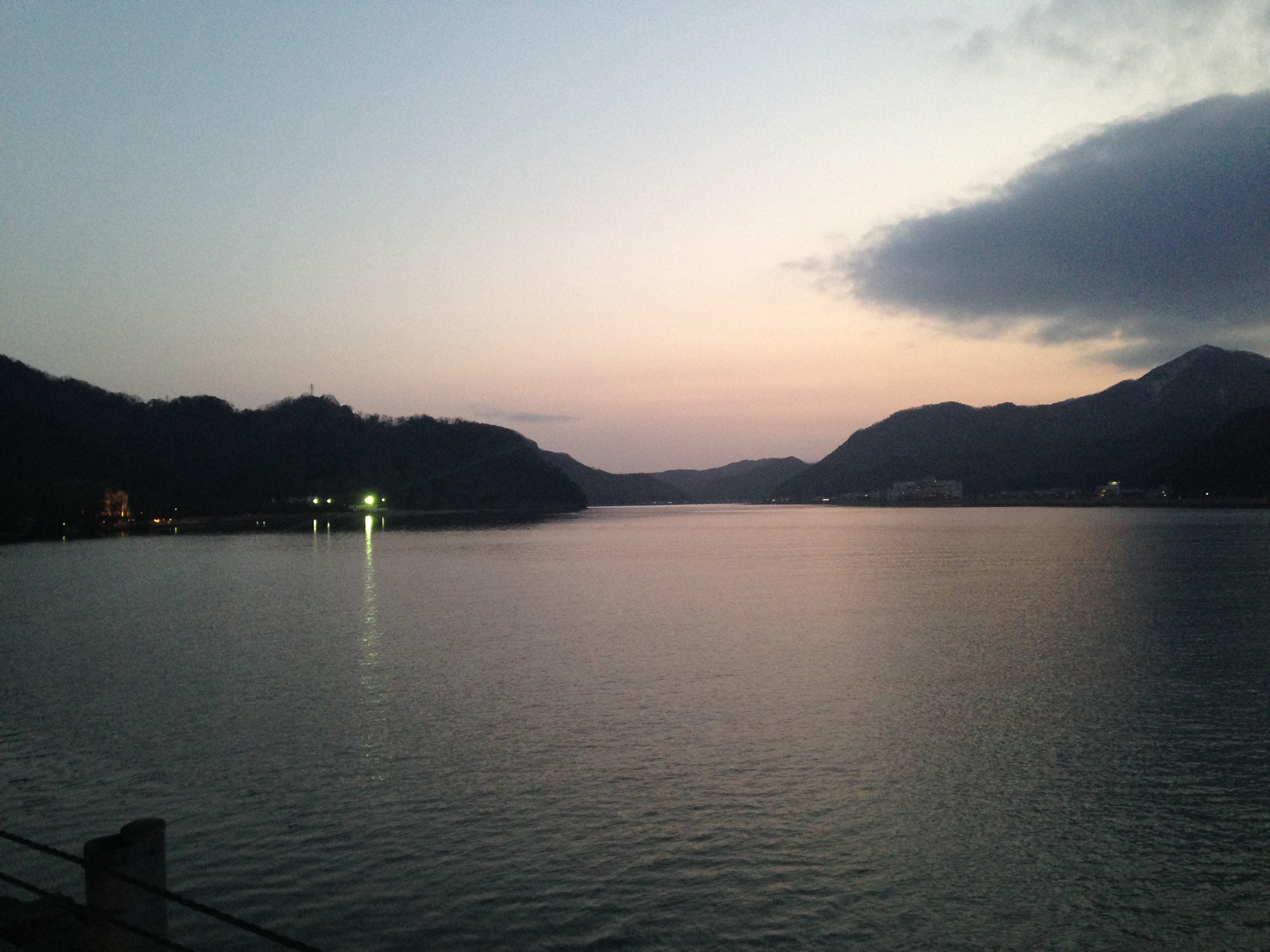 夕暮れ時の円山川